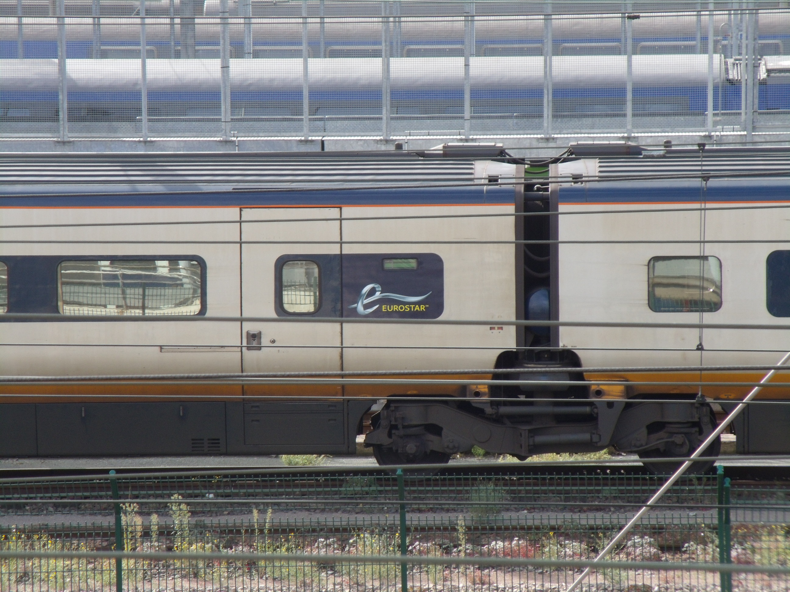 Le logo 2011 sur une rame Eurostar stationnée près du Technicentre du Landy.